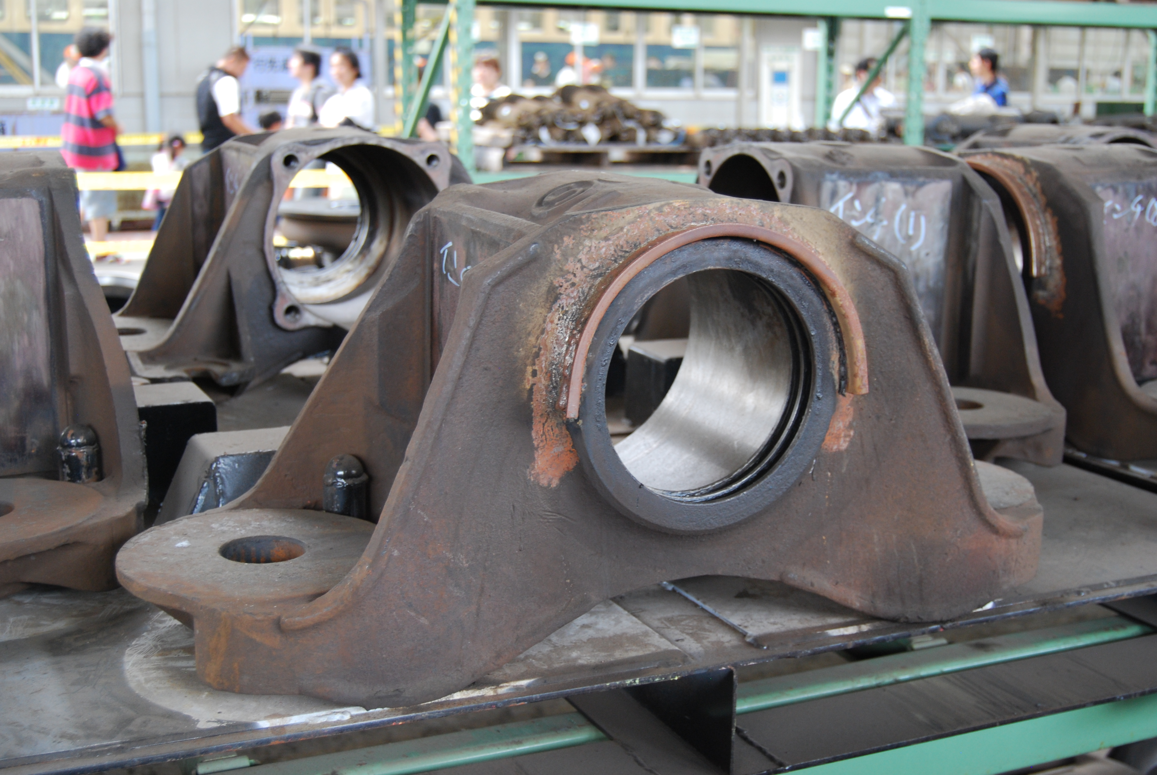 鉄道台車の軸箱、専用の棚にパレットの上に置かれている状態で、中央に車軸と軸受（ベアリング）が入る為の穴がある（JRおおみやふれあい鉄道フェアーでの工場開放にて撮影）